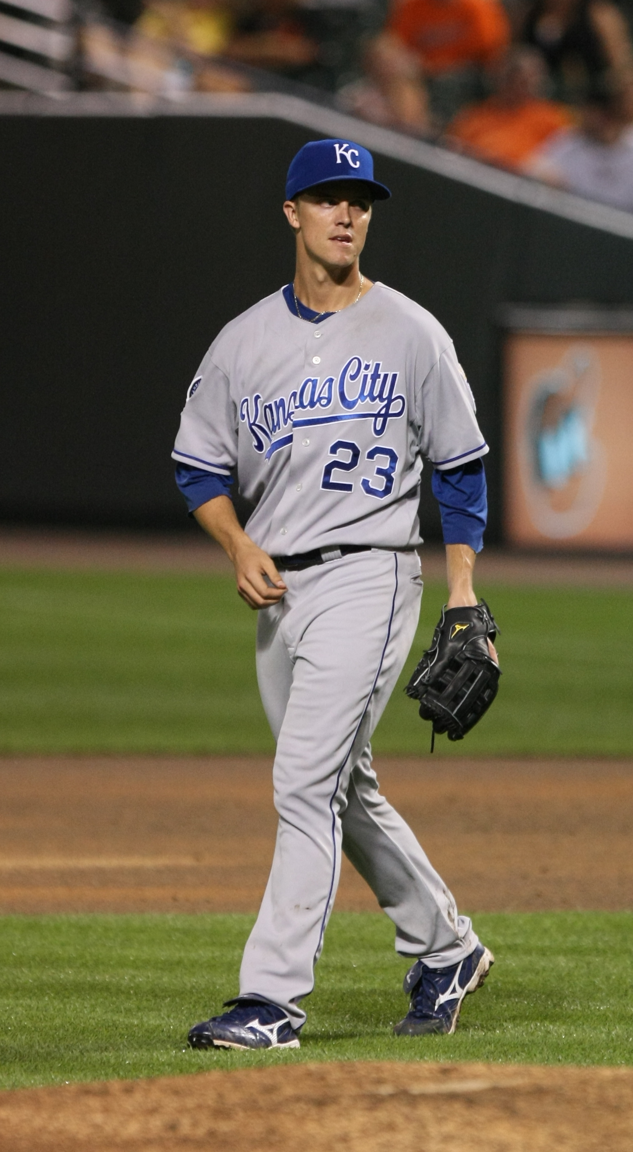 Zack Greinke